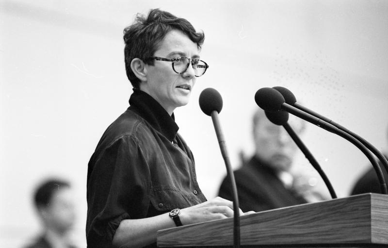 27.9.1990 Sondersitzung des Bundesrates Themen: - befristeter Verbleib amerikanischer, britischer und französischer Streitkräfte in Berlin - Ablösung besatzungsrechtlicher Regelungen in Berlin - Abzug sowjetischer Truppen aus und befristeter Aufenthalt auf dem Gebiet der Bundesrepublik Deutschland nach dem 3. Oktober